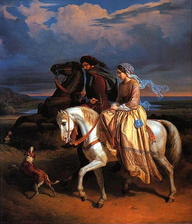 «Con questo dipinto, esposto a Venezia nel 1853, l'artista affrontava per la prima volta il soggetto storico d'ispirazione letteraria, caro alla cultura romantica. Il tema, tratto dal poemetto colmo di suggestioni medievaleggianti di Bartolomeo Sestini che tanto successo ebbe nel primo Ottocento, si sofferma su un episodio trascurato dai pittori, quello del mesto viaggio della Pia verso la sua prigione maremmana. Le figure dei due viaggiatori, minuziosamente descritte, si stagliano sul paesaggio del litorale toscano, reso cupo e malinconico dalla giornata nuvolosa in patetica armonia con lo stato d'animo della giovane sposa desolata. Anche gli animali riflettono i sentimenti dei protagonisti, focoso e irruento l'uno, remissivo e al passo quello della Pia.» (Vedi fonte, p. 232)